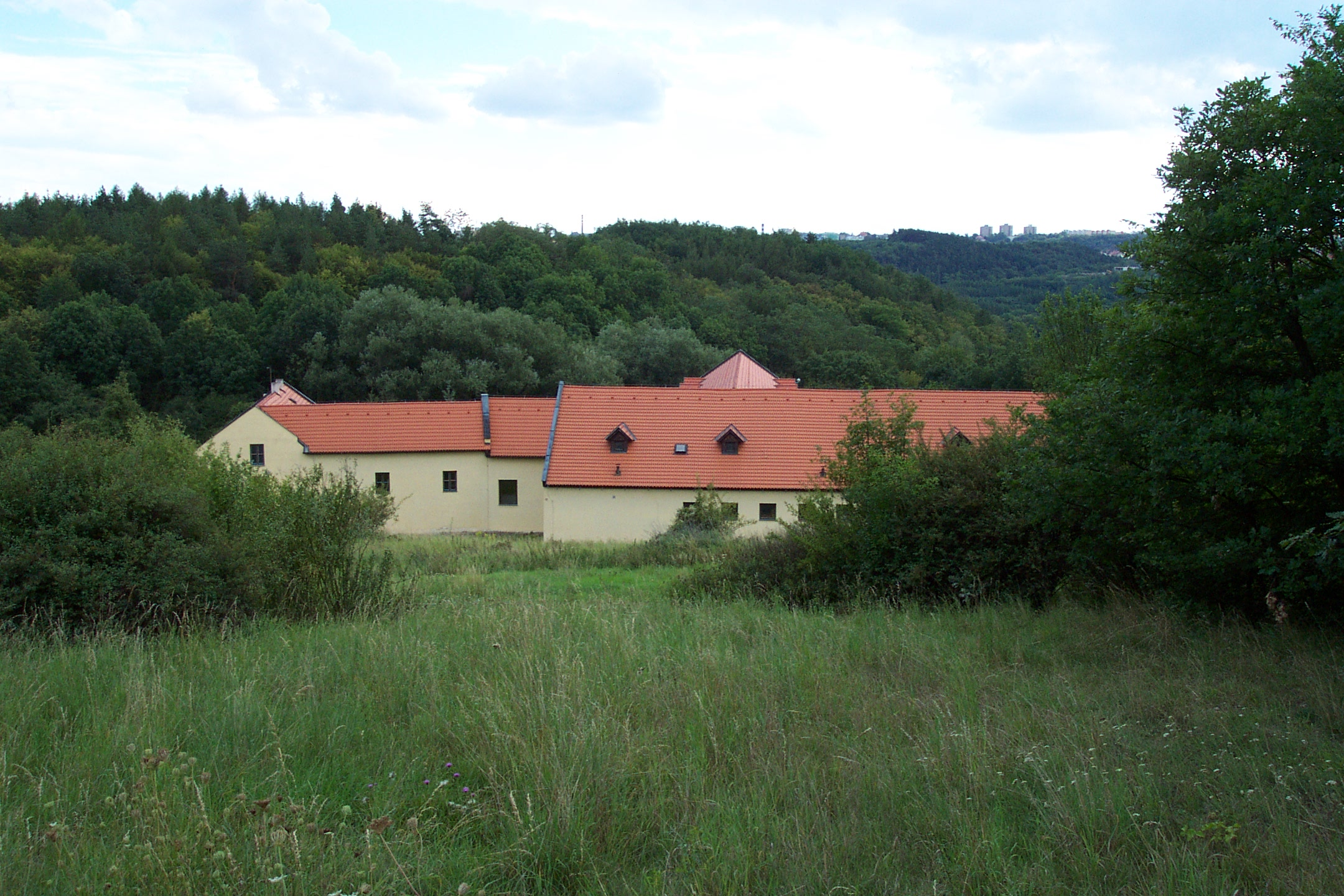 Pražské Dejvice, usedlostnápověda